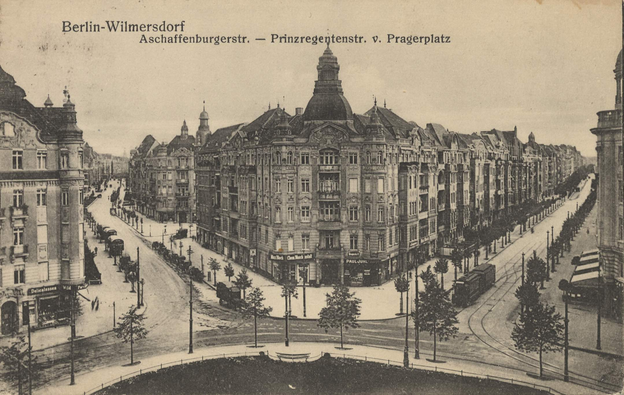 Berlin-Wilmersdorf – Aschaffenburger Straße, Prinzregentenstraße vom Prager Platz